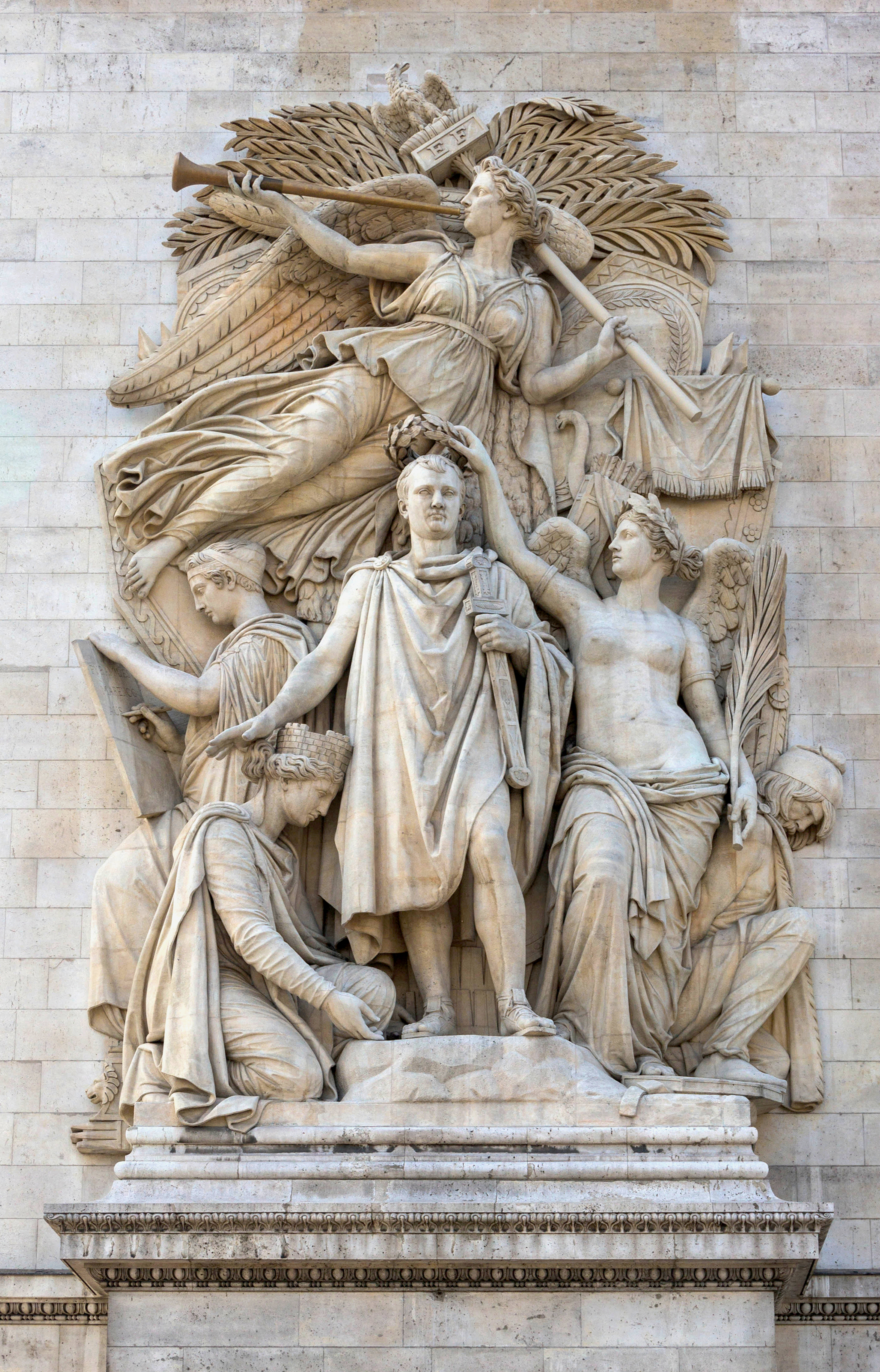 Le Triomphe de 1810, par Jean-Pierre Cortot, Arc de Triomphe de l'Etoile, Paris.